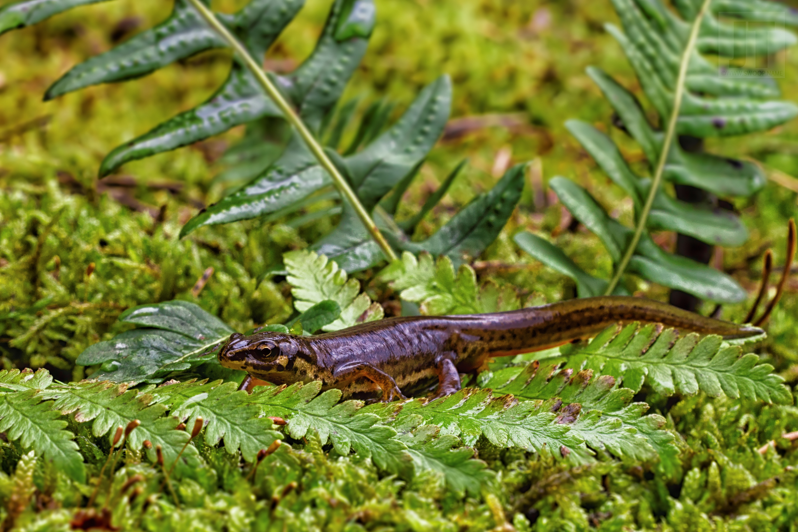 Čolek obecný (Lissotriton vulgaris) je 6 - 10 cm velký obojživelník. Samec je větší, dosahuje velikosti maximálně 10 cm, samice bývají menší.